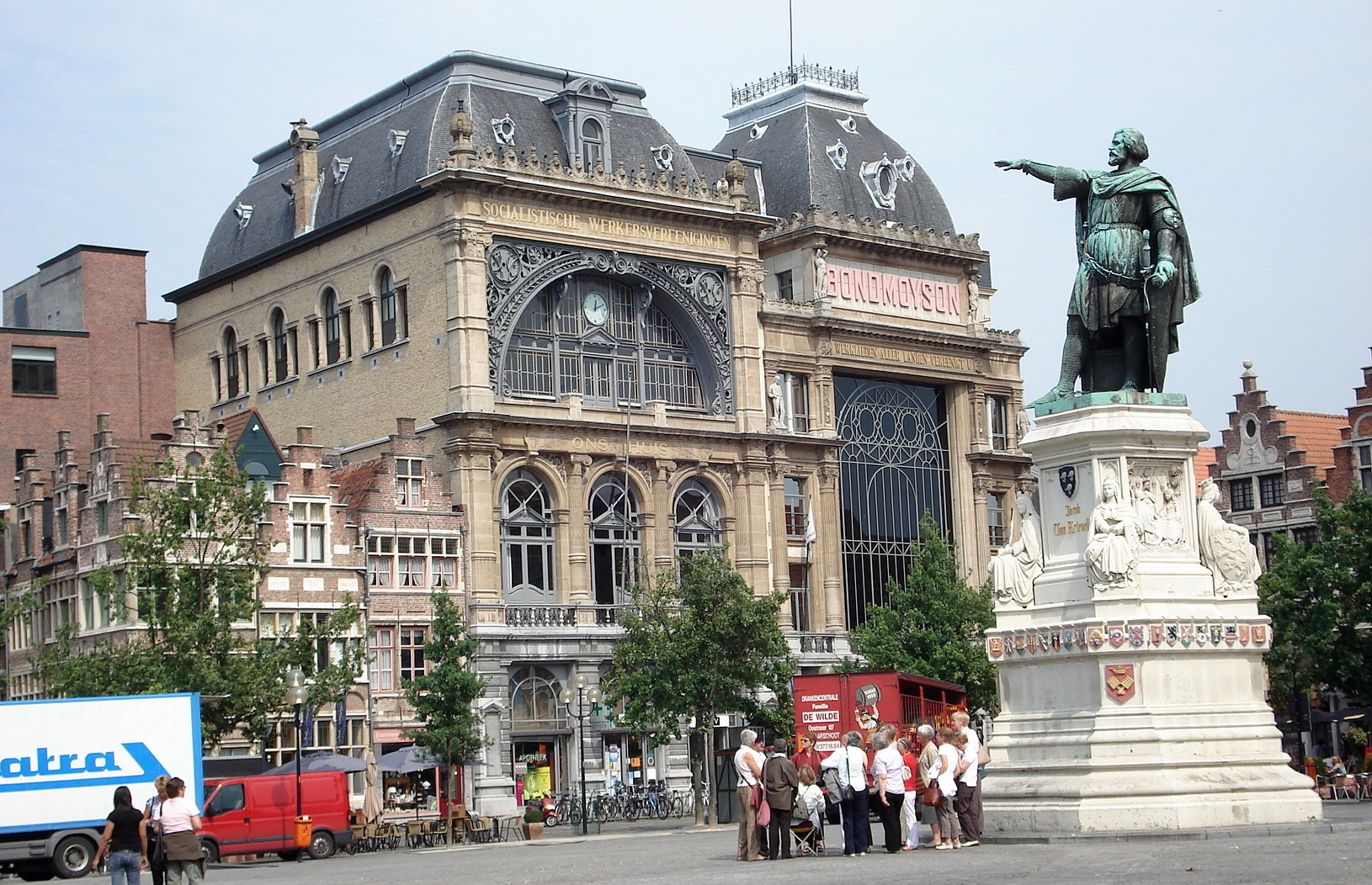 Gent, Volkshuis, op de Vrijdagmarkt. Op voorgrond, standbeeld van Jacob van Artevelde. Gand, Belgique: Maison du peuple, marché du Vendredi. À l'avant-plan, statue de Jacques d'Artevelde.